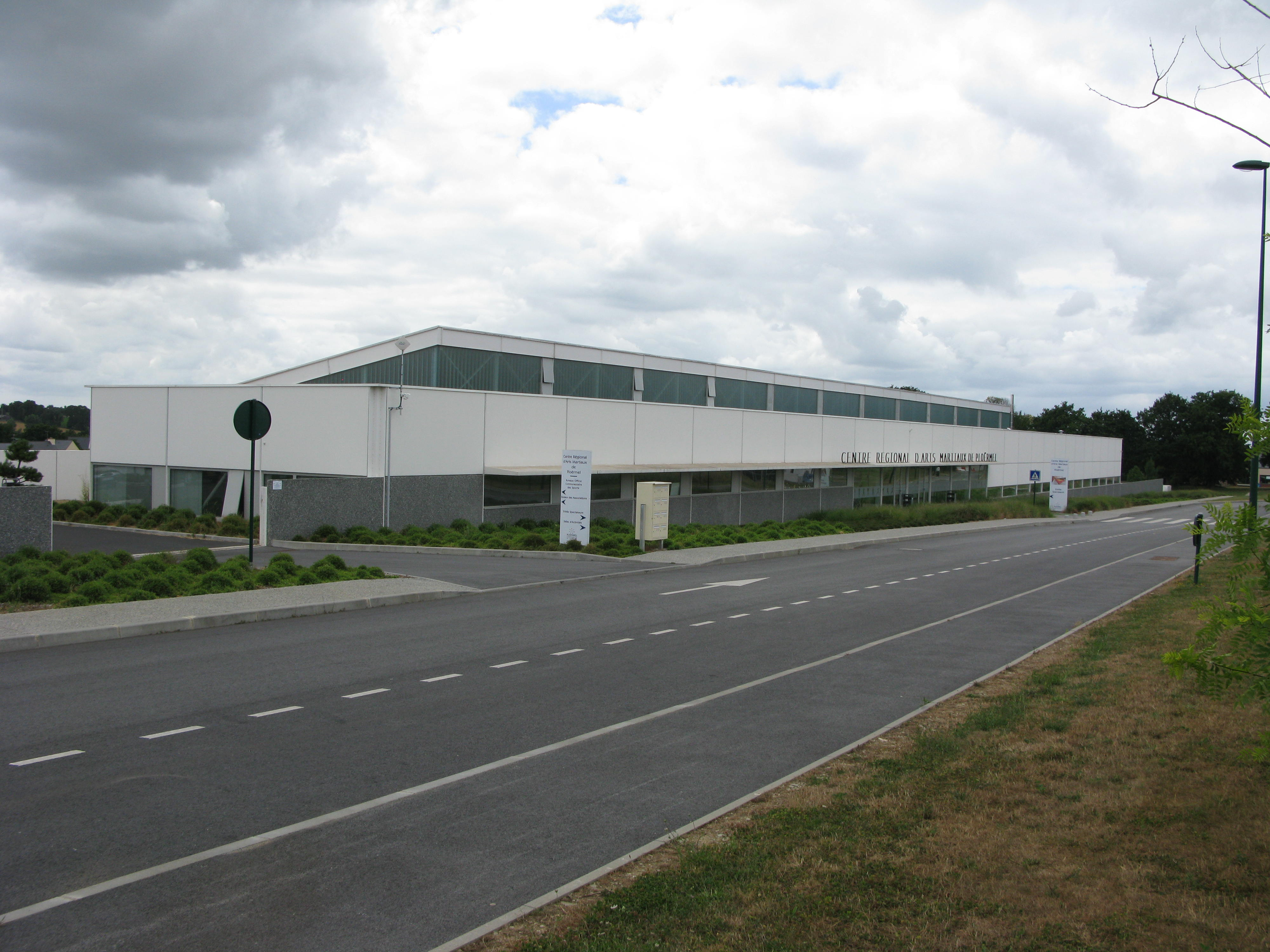 Centre régional des arts martiaux, Ploërmel (Morbihan, France)